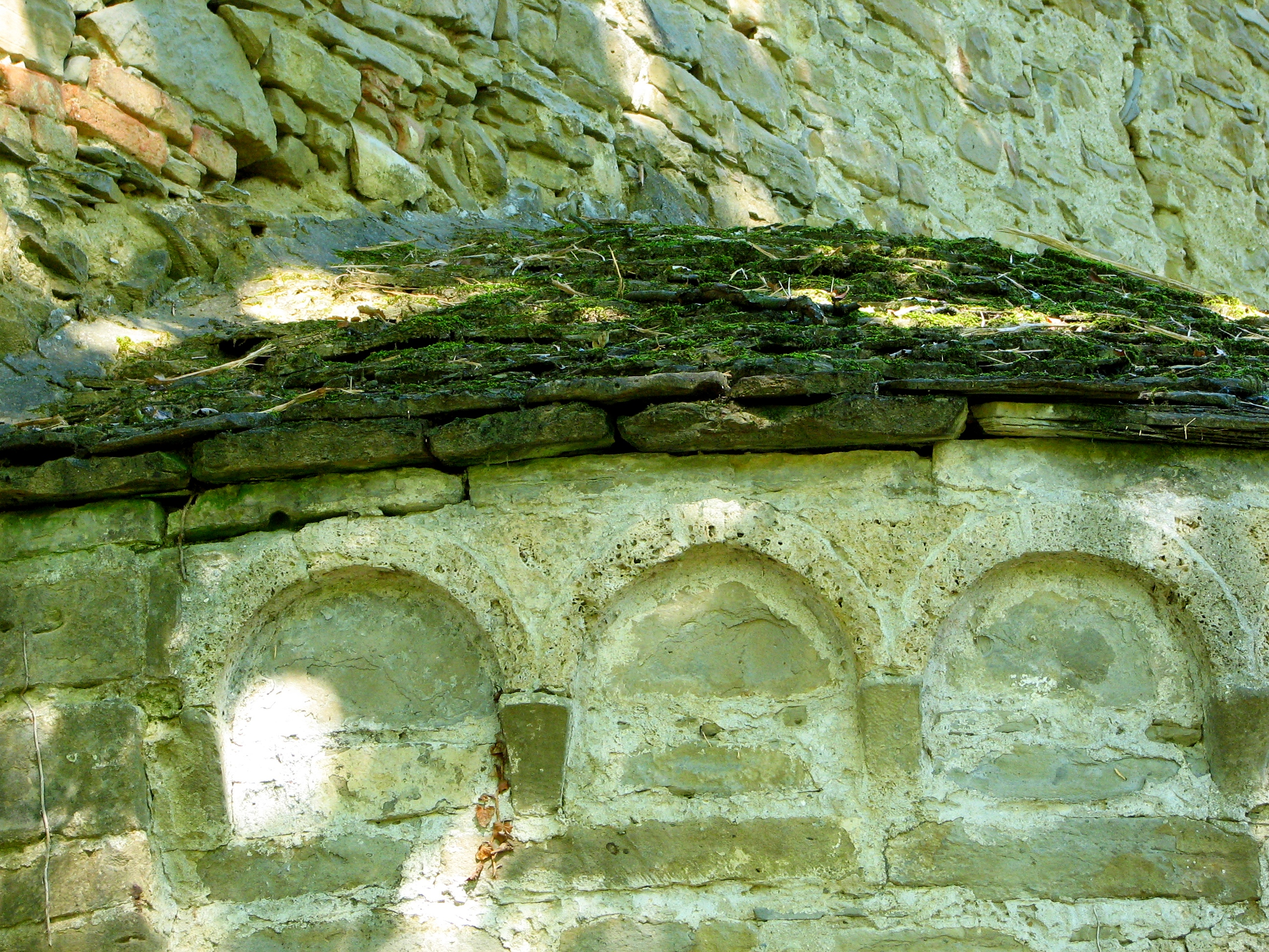 L'abside della cappella possiede un coronamento ad archetti